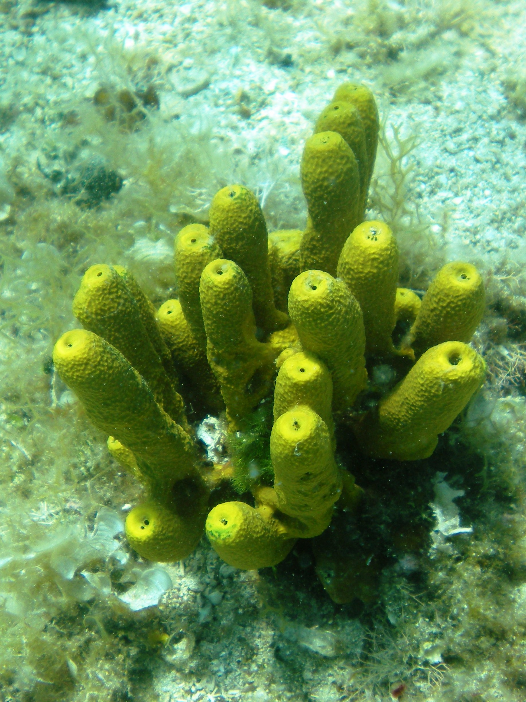 Aplysina aerophobamar Adriatico, isola di Brac (Croatia)